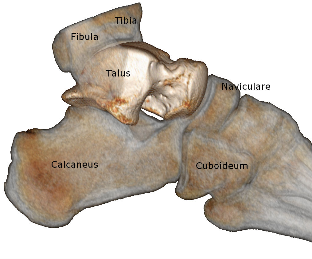 Darstellung der Lage des Talus in Verband der umgebenden Knochen. Volume-rendering-Rekonstruktion aus einem Computertomographiedatensatz mit halbtransparenter Darstellung der umgebenden Knochen. Ansicht von aussen (lateral).